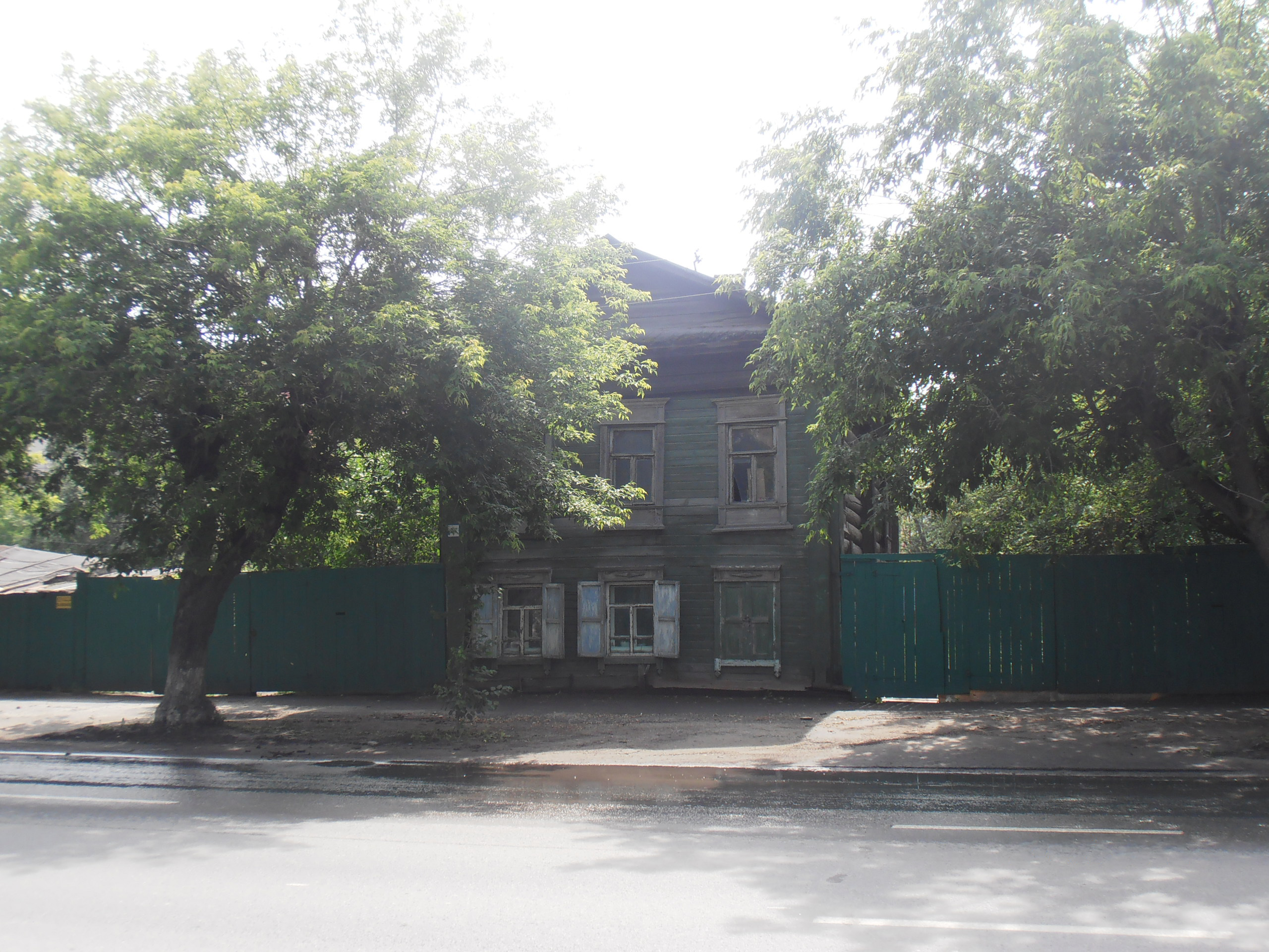 Деревянный дом по ул. Осипенко, 28 в г. Тюмени. По утверждению проф. В. Е. Копылова, здесь в 1924-1926 годах проживал А. Н. Косыгин.